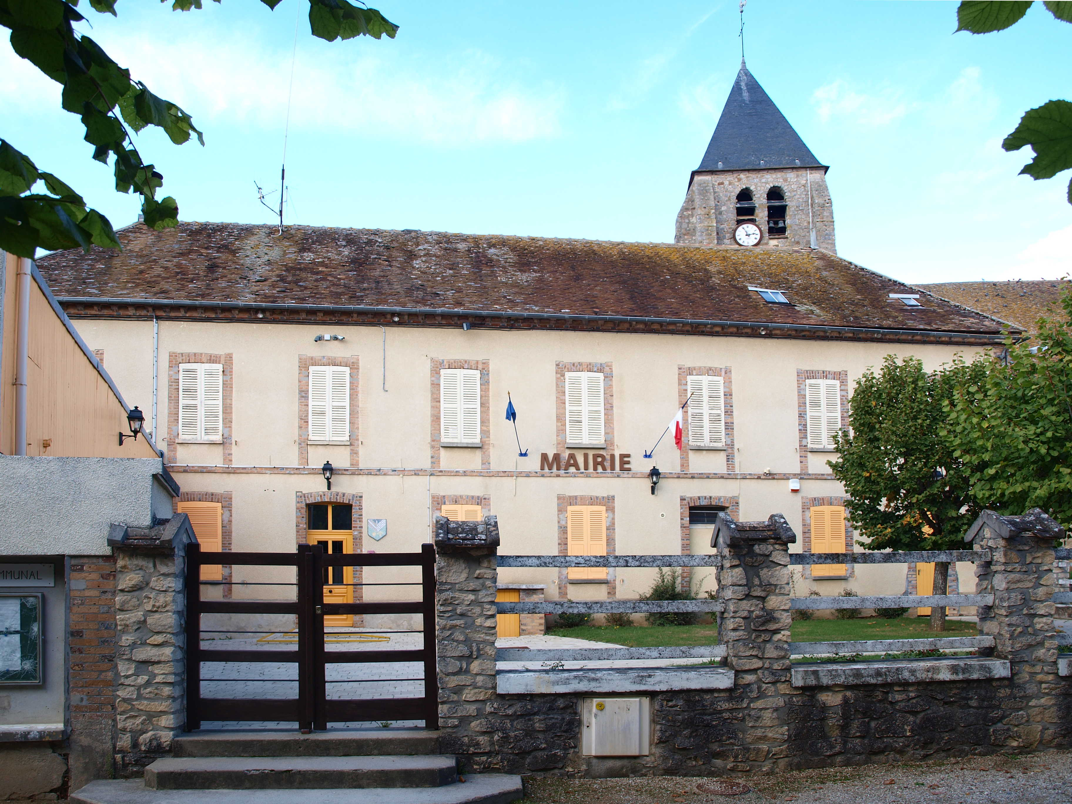 Michery (Yonne, France) ; la mairie.